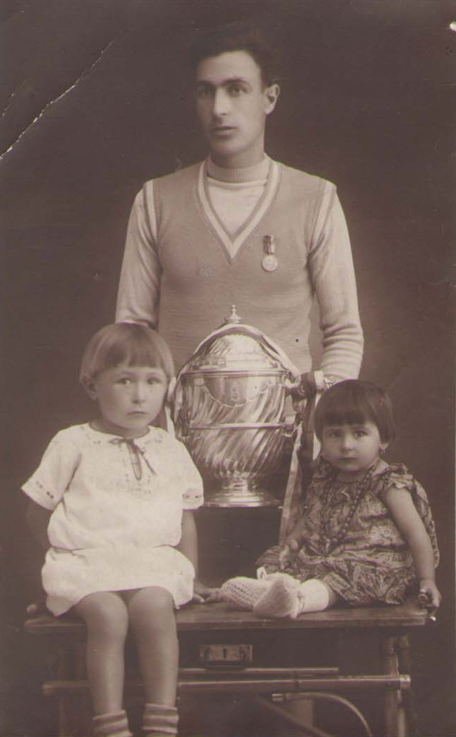 Здравко Янакиев с двете си дъщери и царската купа от 1933г.спечелена с "Шипченски сокол"